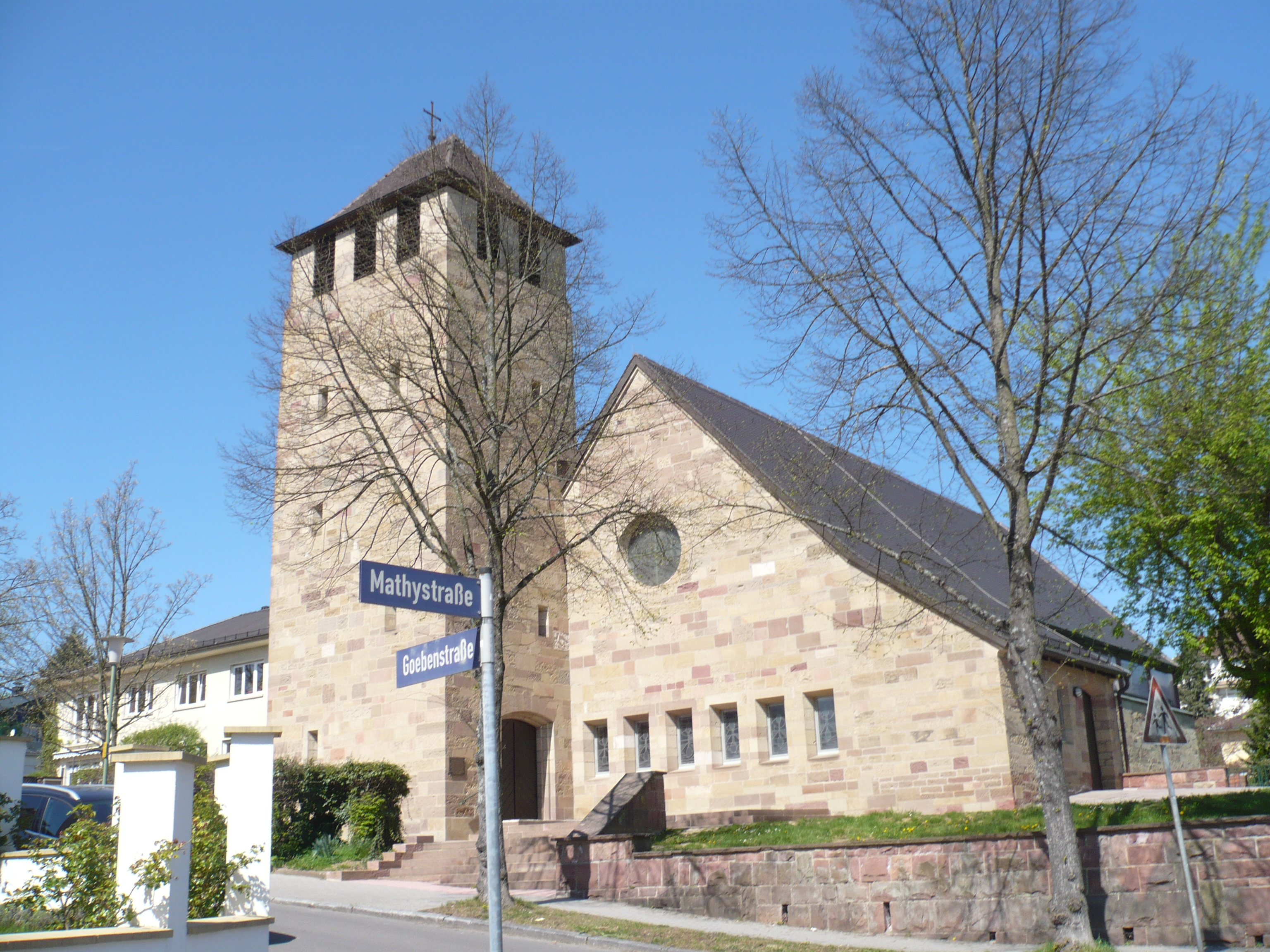 Auferstehungskirche in Pforzheim, Germany